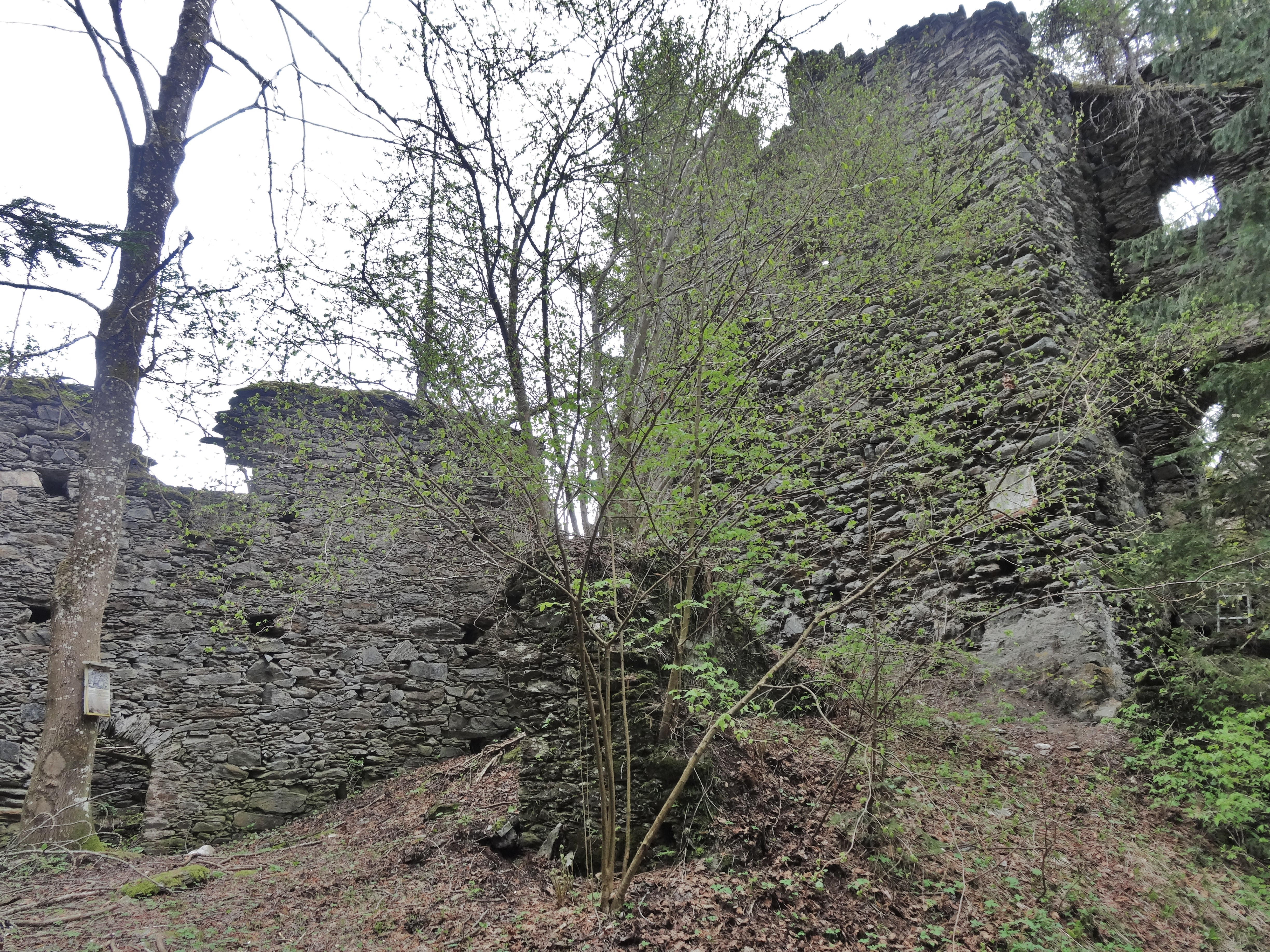 Burgruine Prägrad bei Feldkirchen in Kärnten